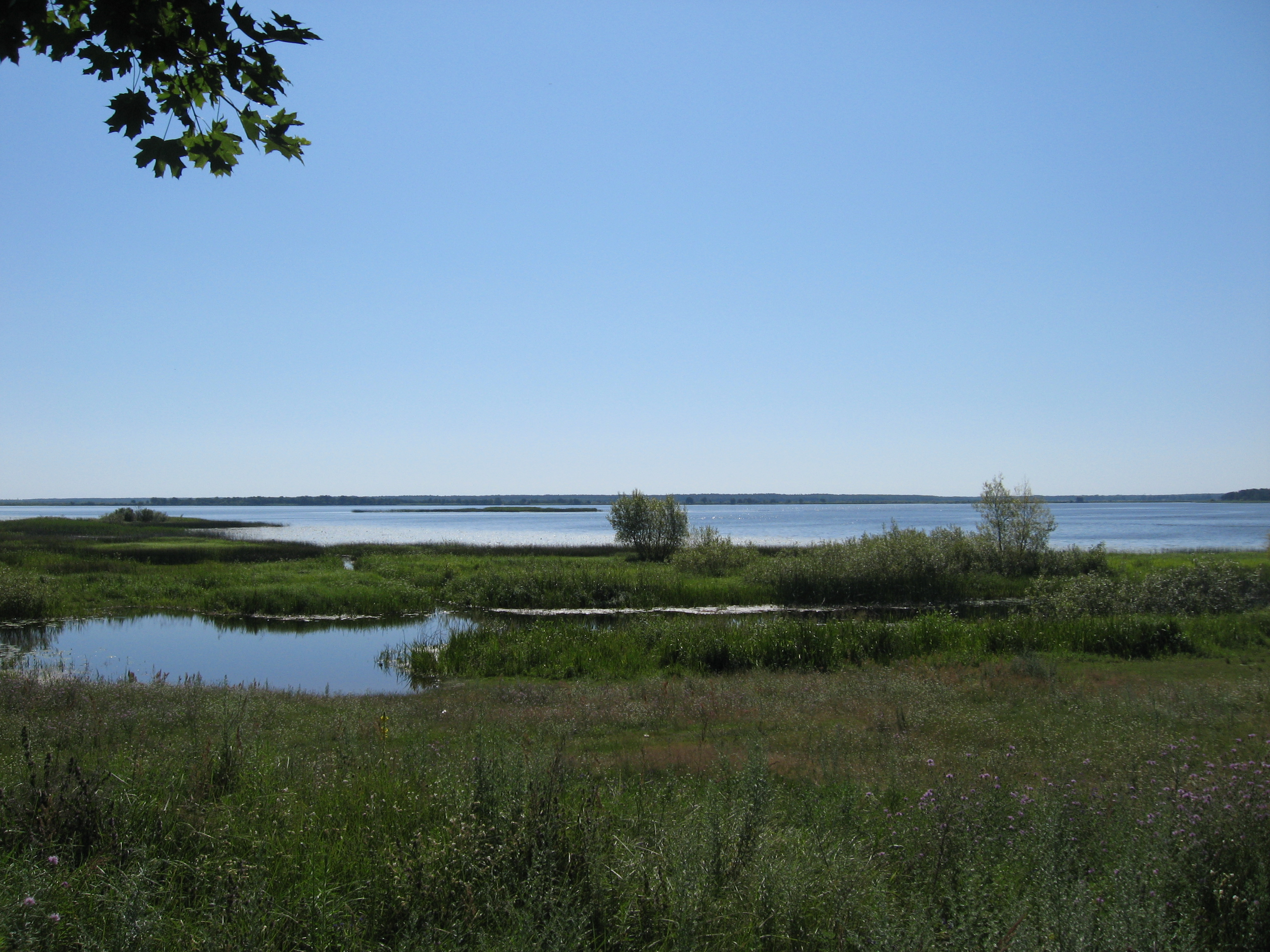 Національний природний парк «Прип'ять-Стохід»